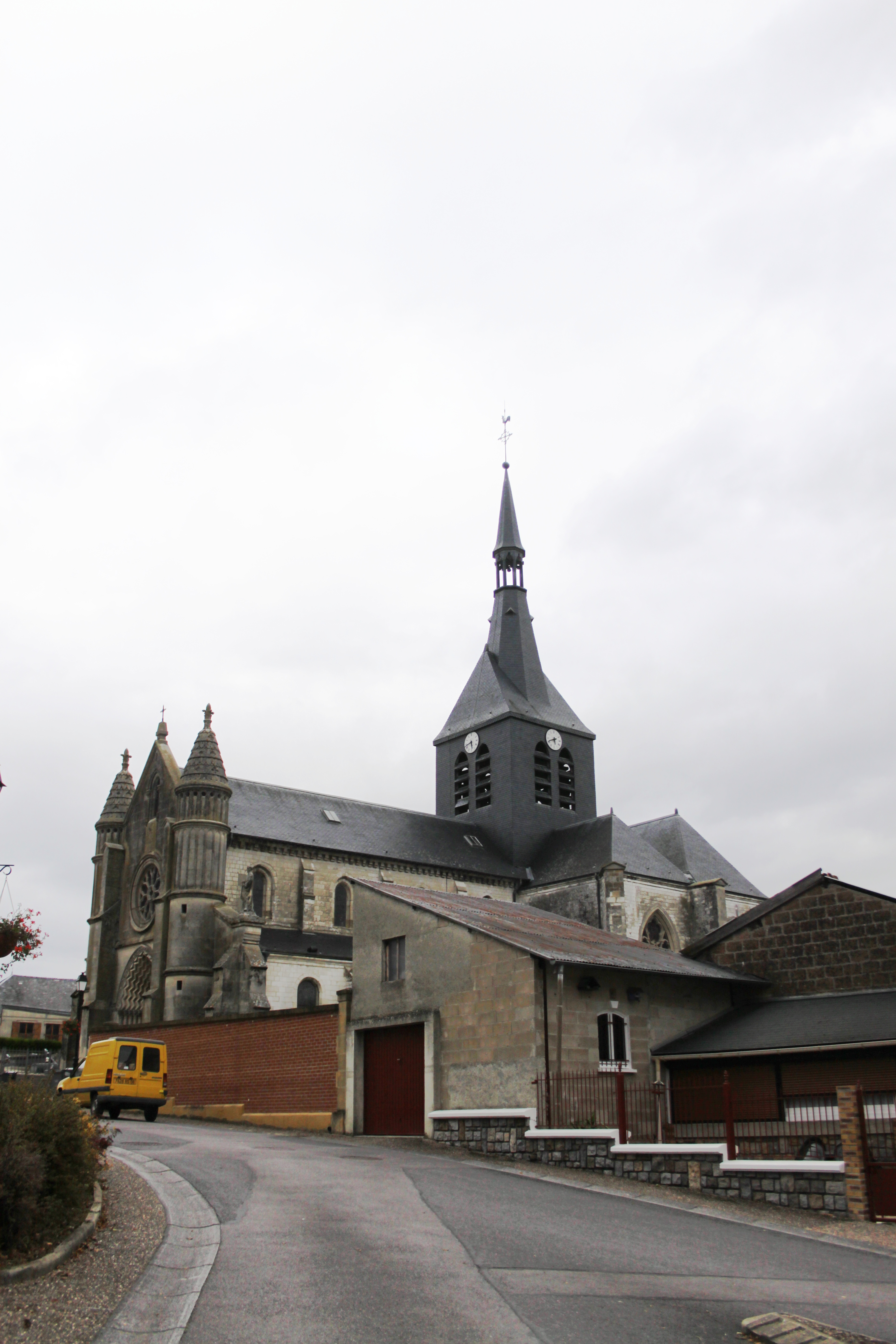 Église Saint-Pierre de Tagnon (Ardennes, France) .